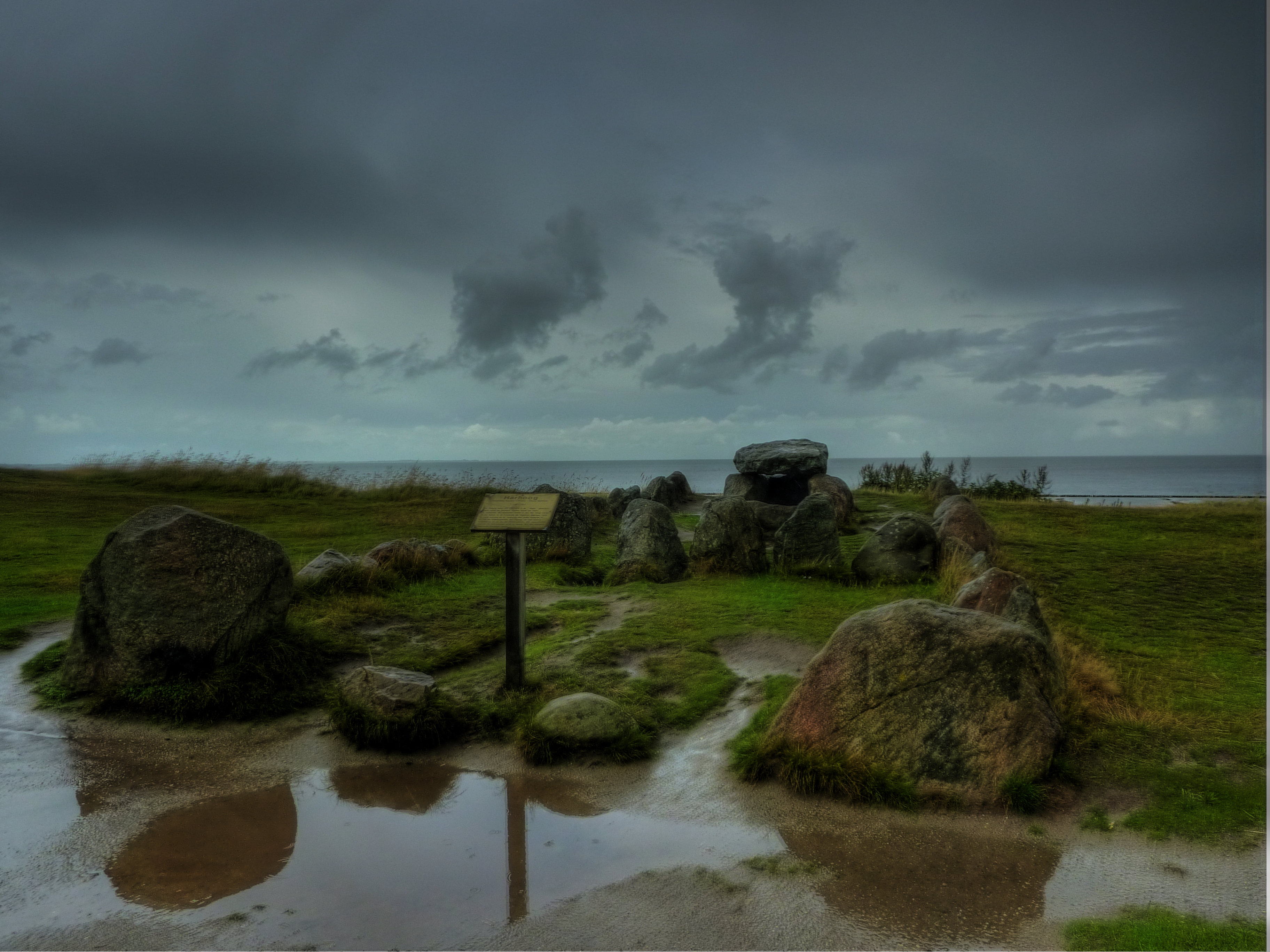 Harhoog auf Sylt